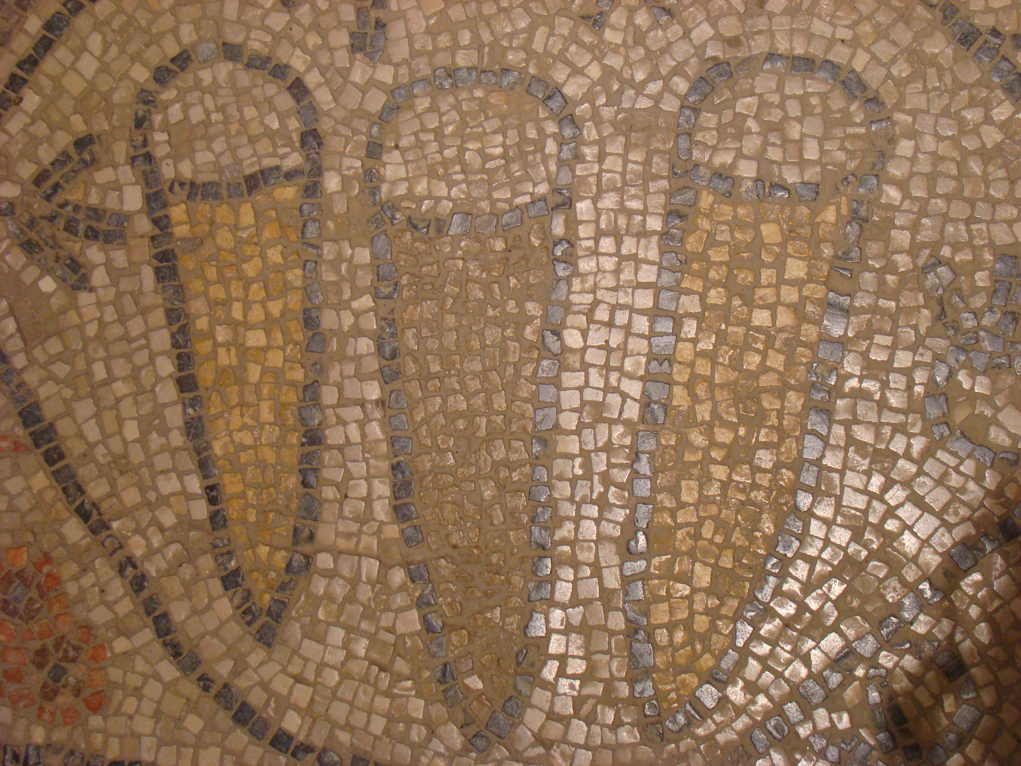 פסיפס בית הכנסת בית אלפא